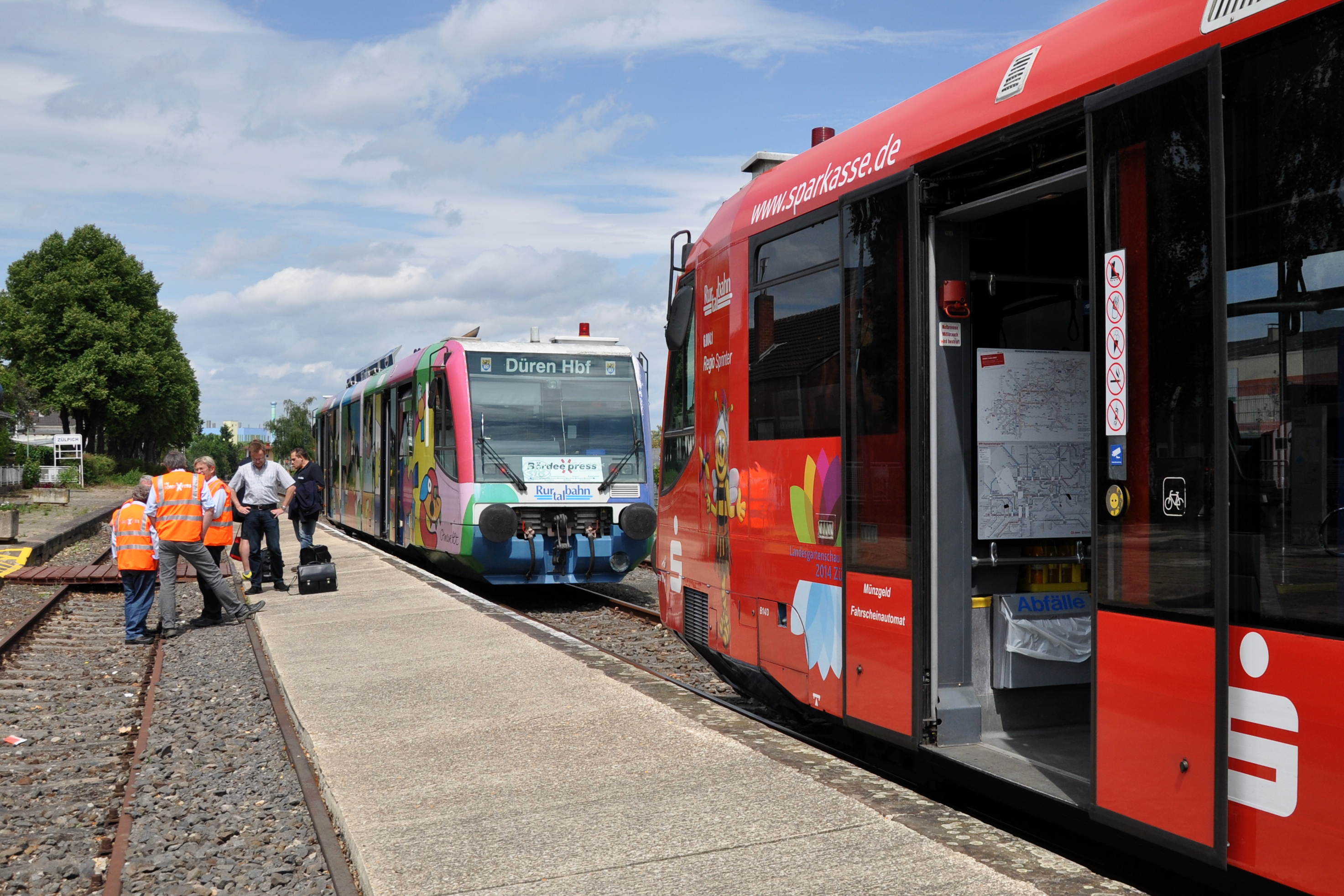 Begegnung der Züge nach Düren und Euskirchen in Zülpich.